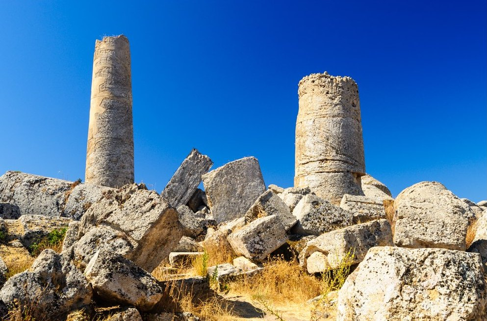 Selinunte, Sicily